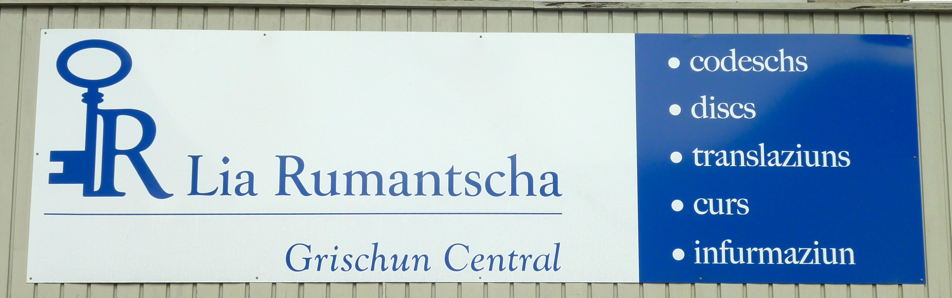 Lia Rumantsch in Savognin Rumantsch: Lia Rumantsch a Savognin